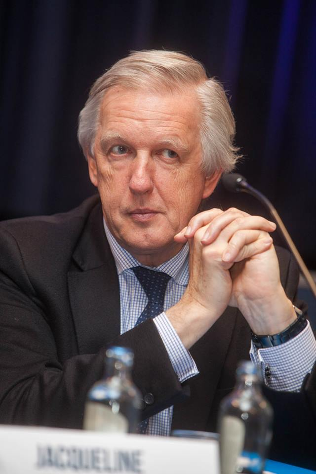 Daniel Bacquelaine lors de la tournée de présentation de l'accord de Gouvernement, le 2 décembre 2014, à Wavre